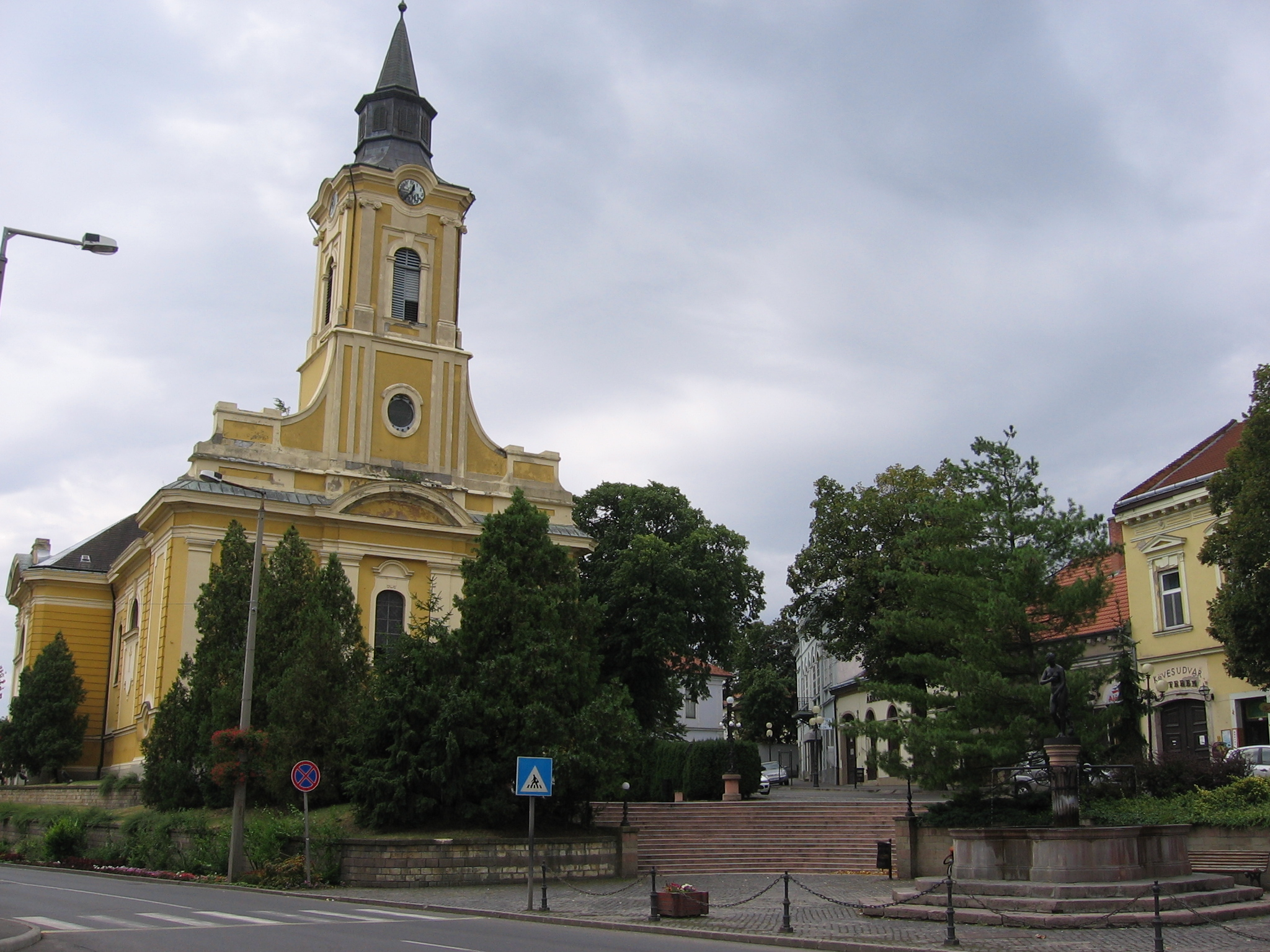 Sátoraljaújhely main street Główna ulica Sátoraljaújhely